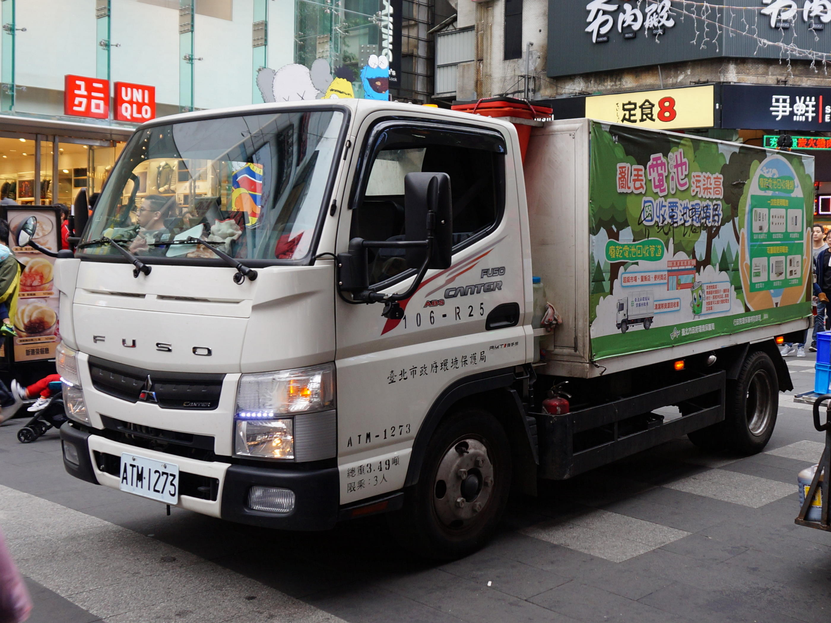 臺北市政府環境保護局三菱堅達資源回收車ATM-1273。